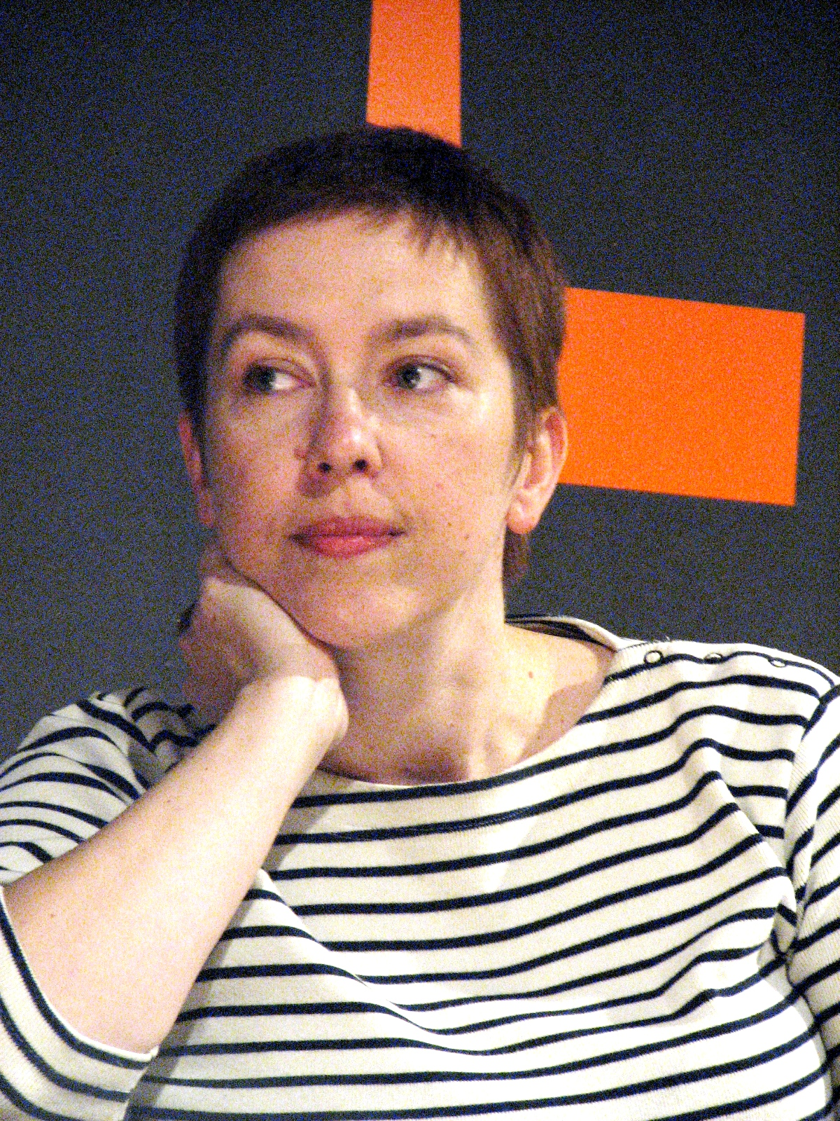 Triin Tael esinemas Püha Hieronymuse päeval